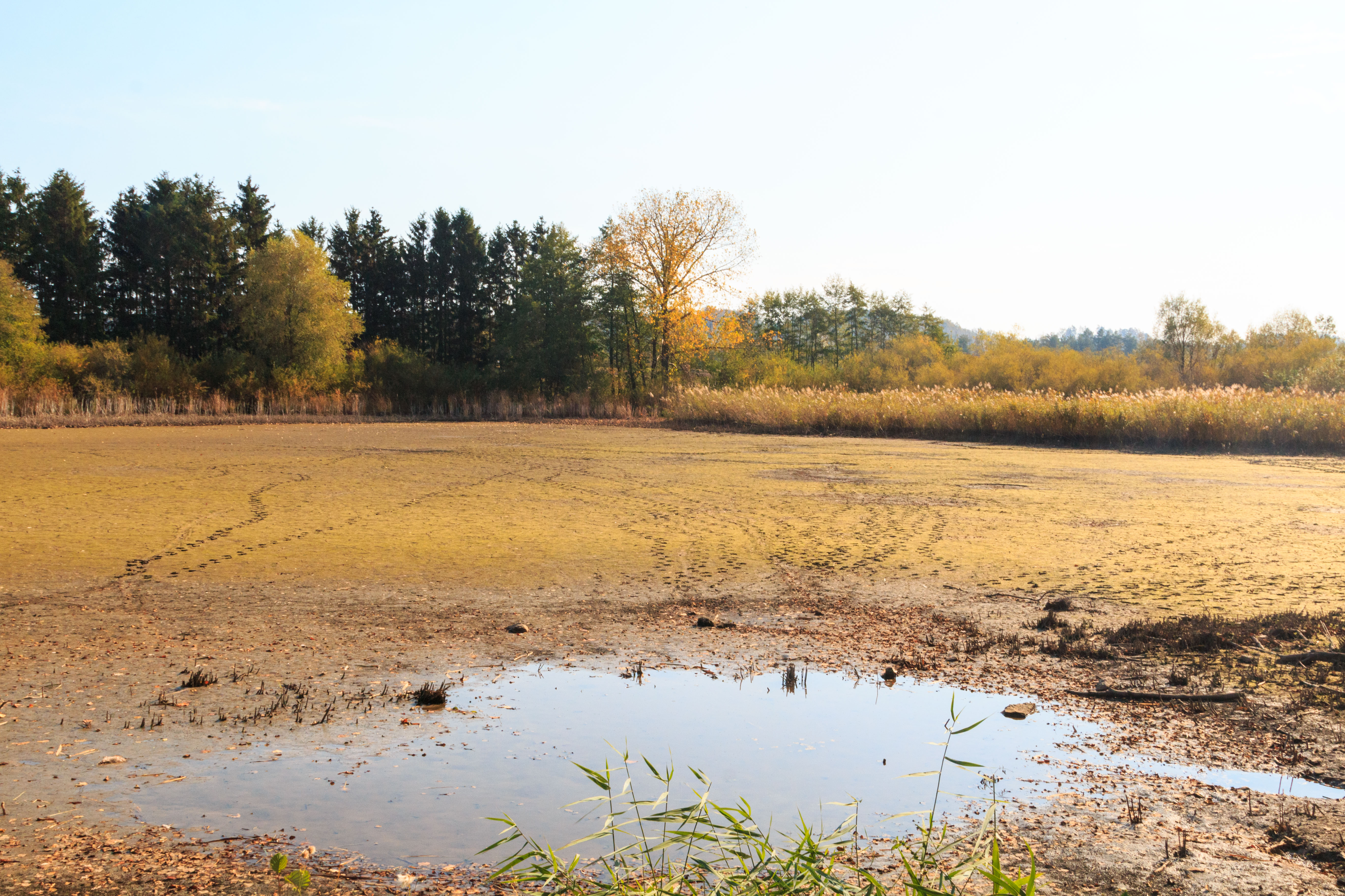 Rybník Kutín u Miřetic Project: Vodstvo. Ticket: 1617.